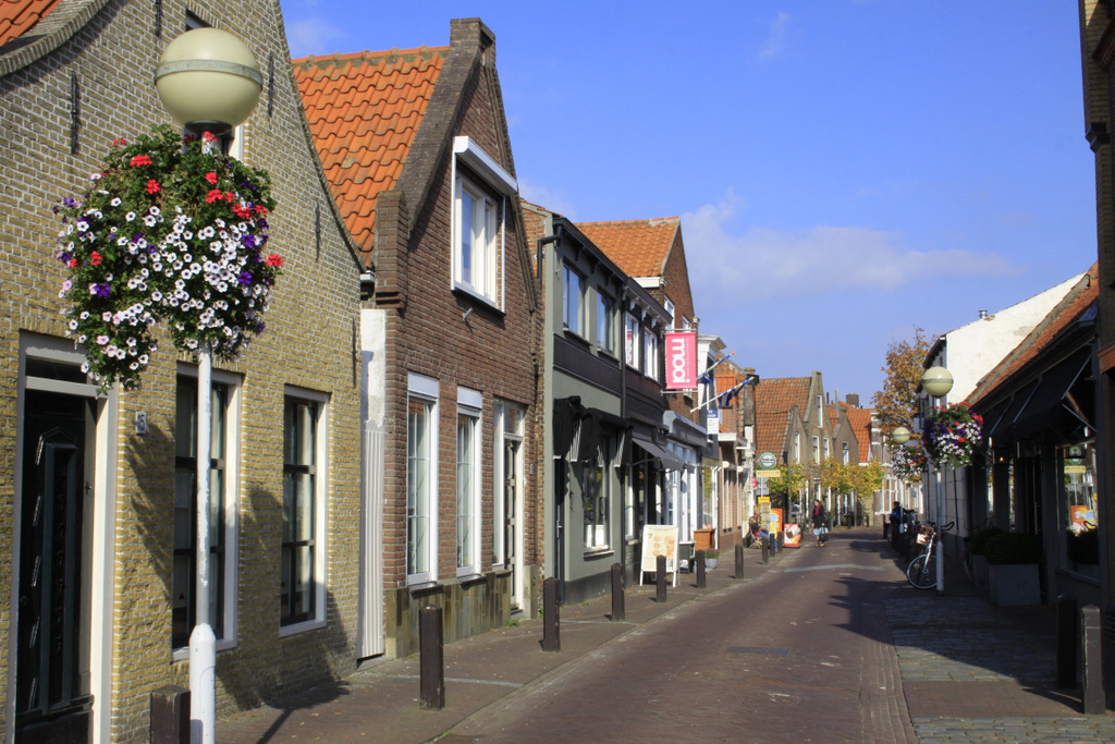 Bruinisse op zijn mooist compleet met een bloemetje in de Nieuwstraat